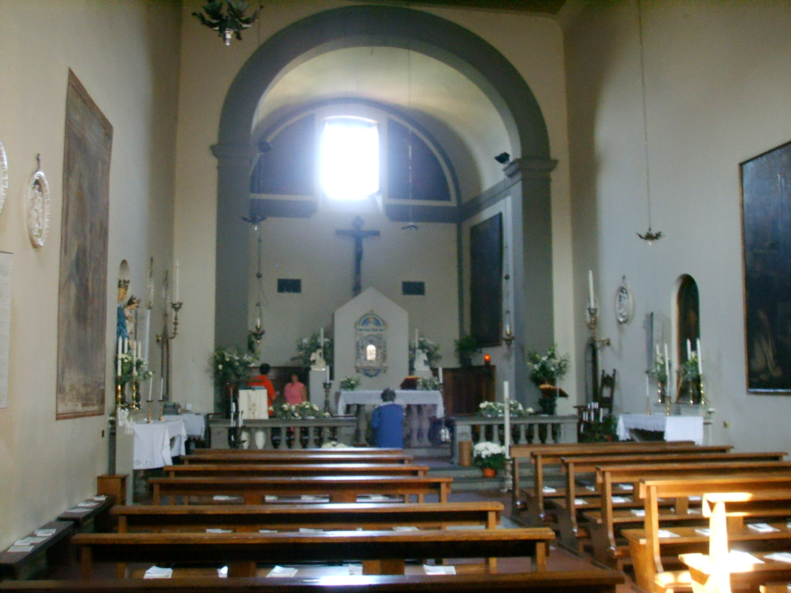 Sant'ilario a colombaia 02 interno